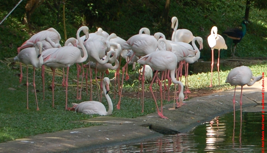 Burung flamingo di Taman Burung Kuala Lumpur, Malaysia 2008